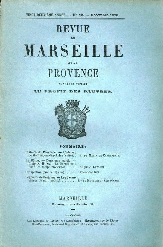 Revue de Marseille et de Provence, décembre 1876, couverture.